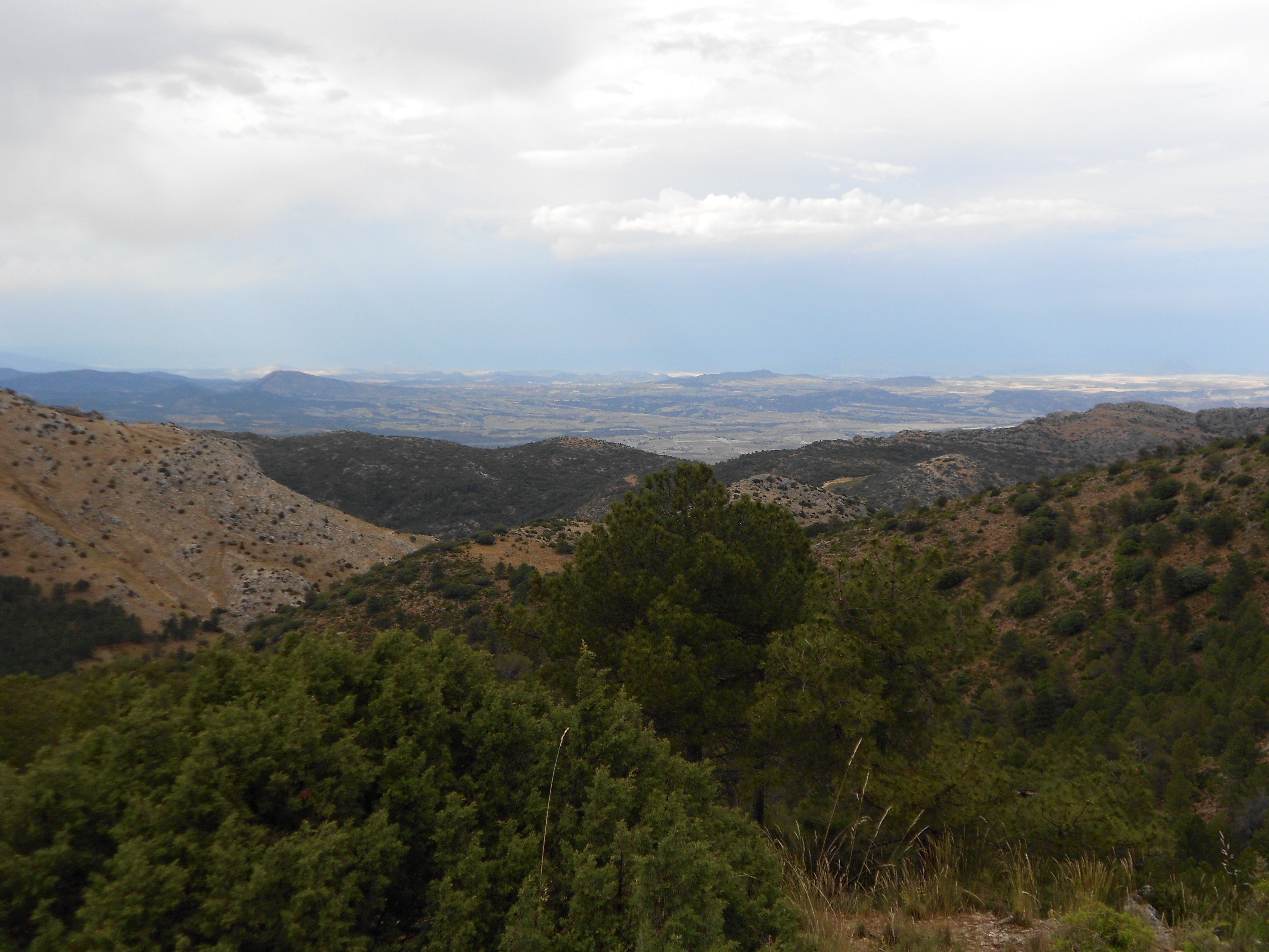 Sierra Espuña This is a photography of a Special Area of Conservation in Spain with the ID: ES0000173. Natura2000 entry, EEA entry